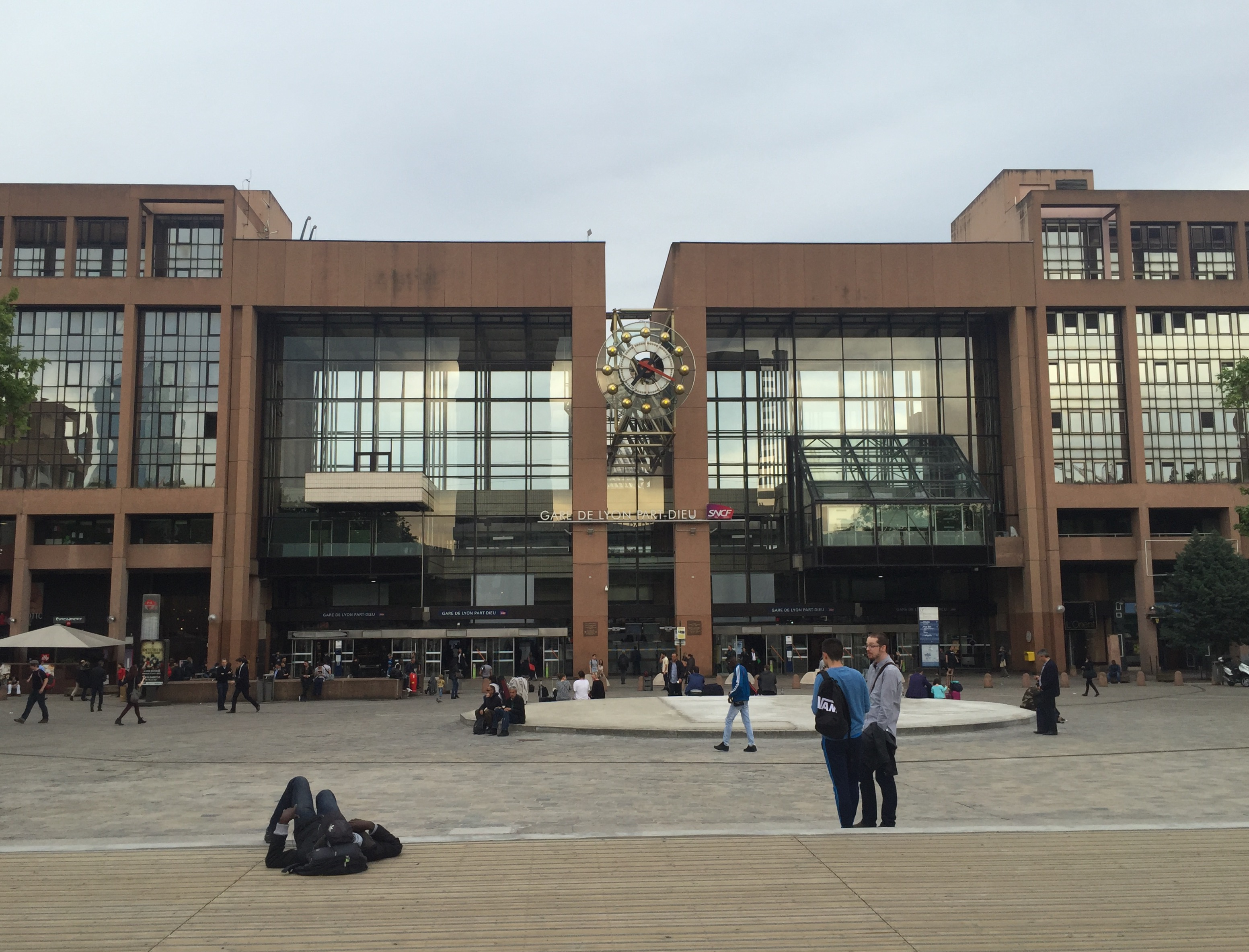 La gare Part-Dieu en 2016.